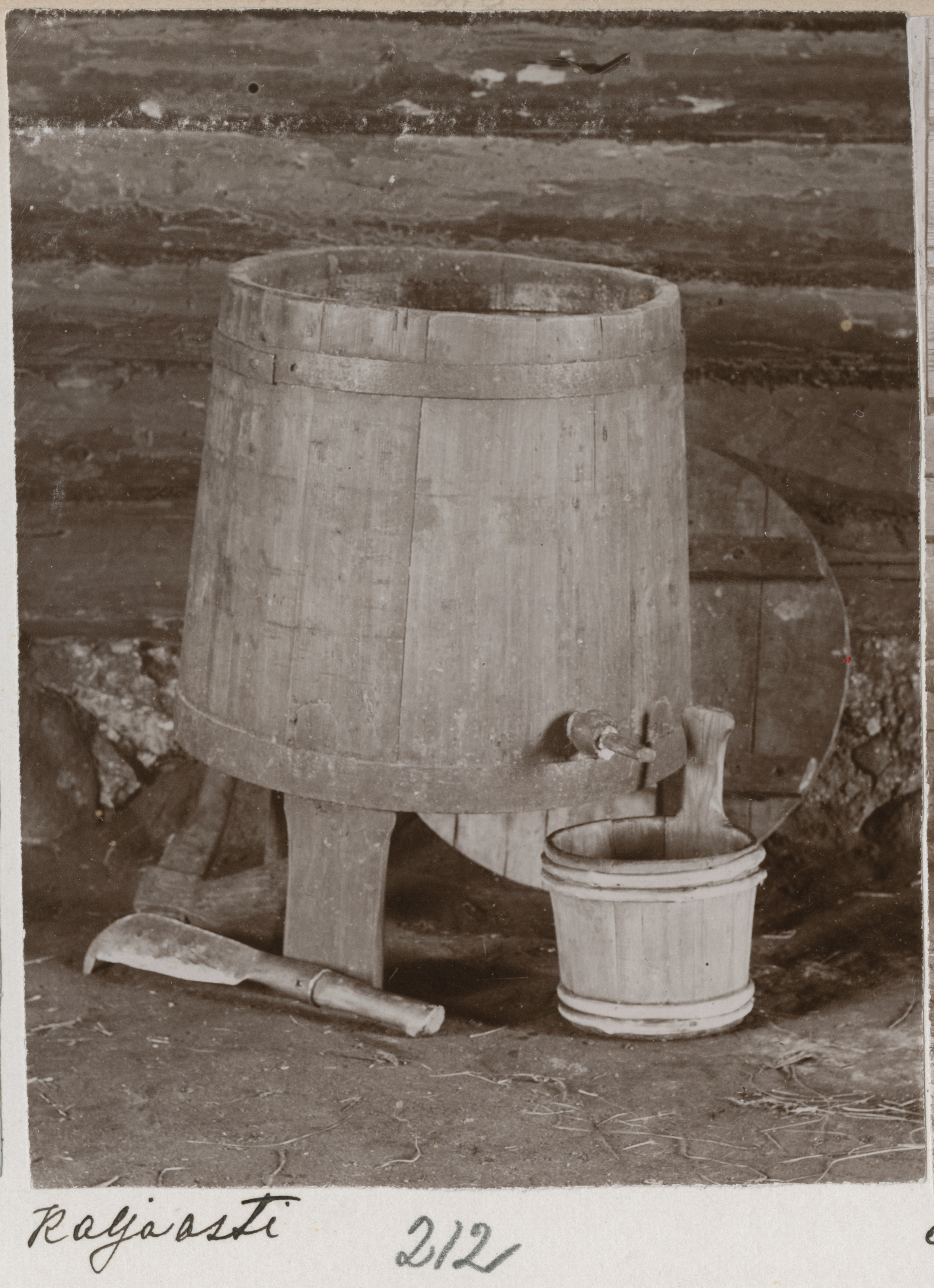 Kaljaastjas